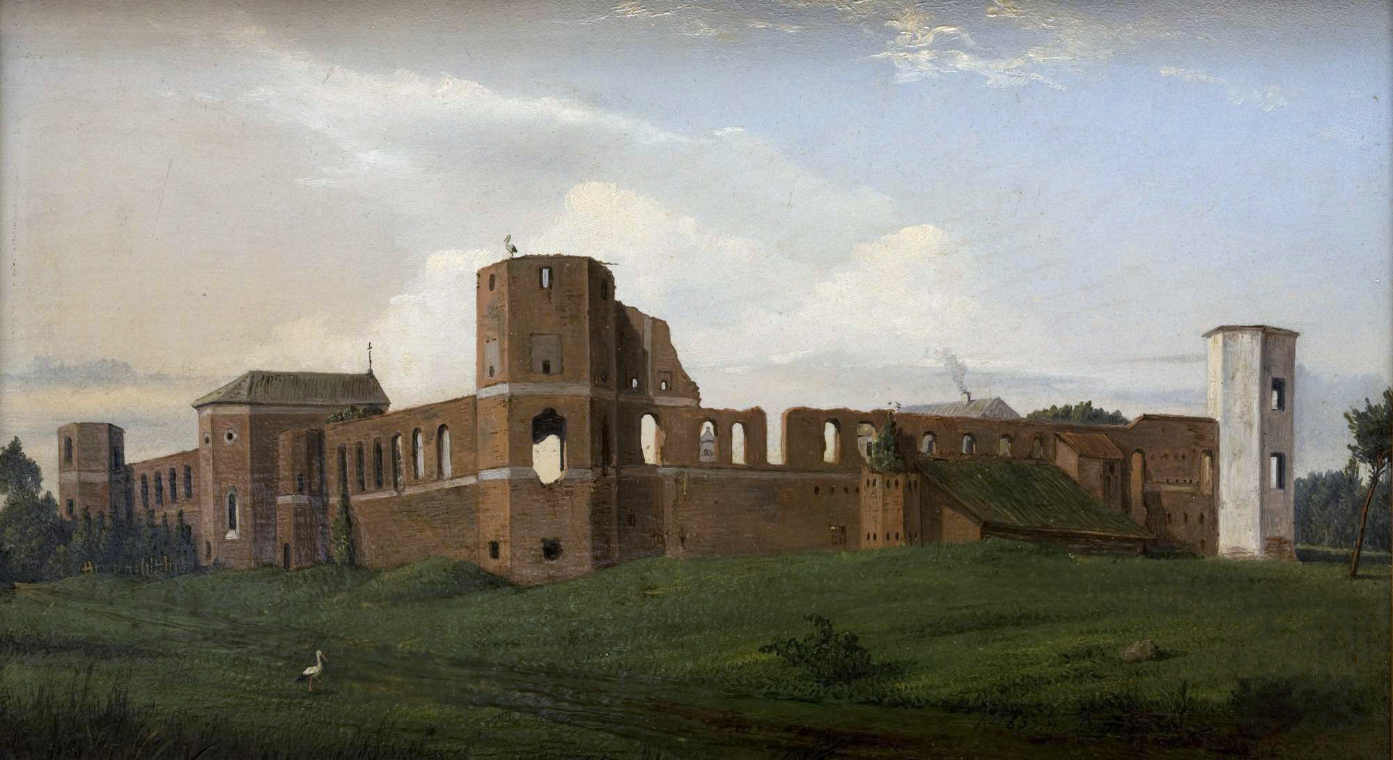 1853. Руіны замка ў Гальшанах Беларуская (тарашкевіца): Гальшаны (Halšany). Замак